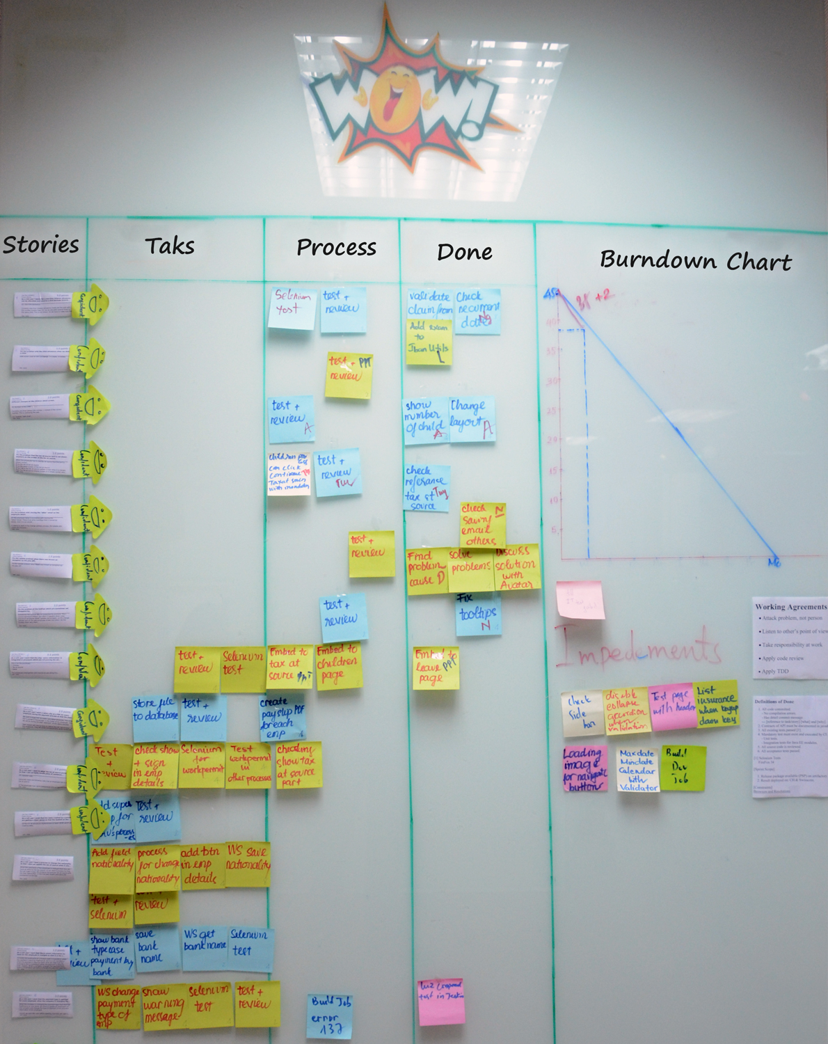 Bảng scrum và biểu đồ burn down được áp dụng trong thực tế giúp nhóm bám sát tiến độ dự án